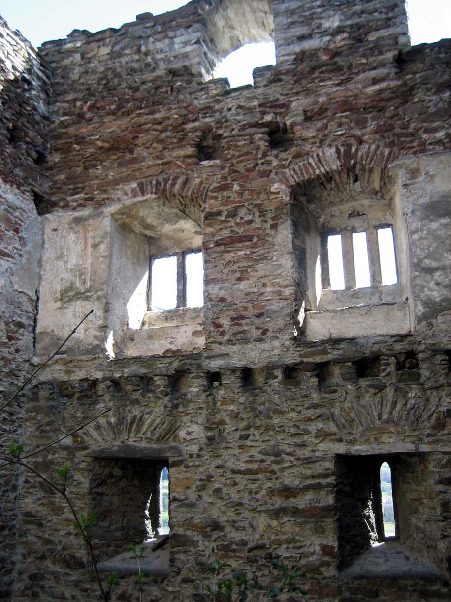 Neuburg, Wohnräume